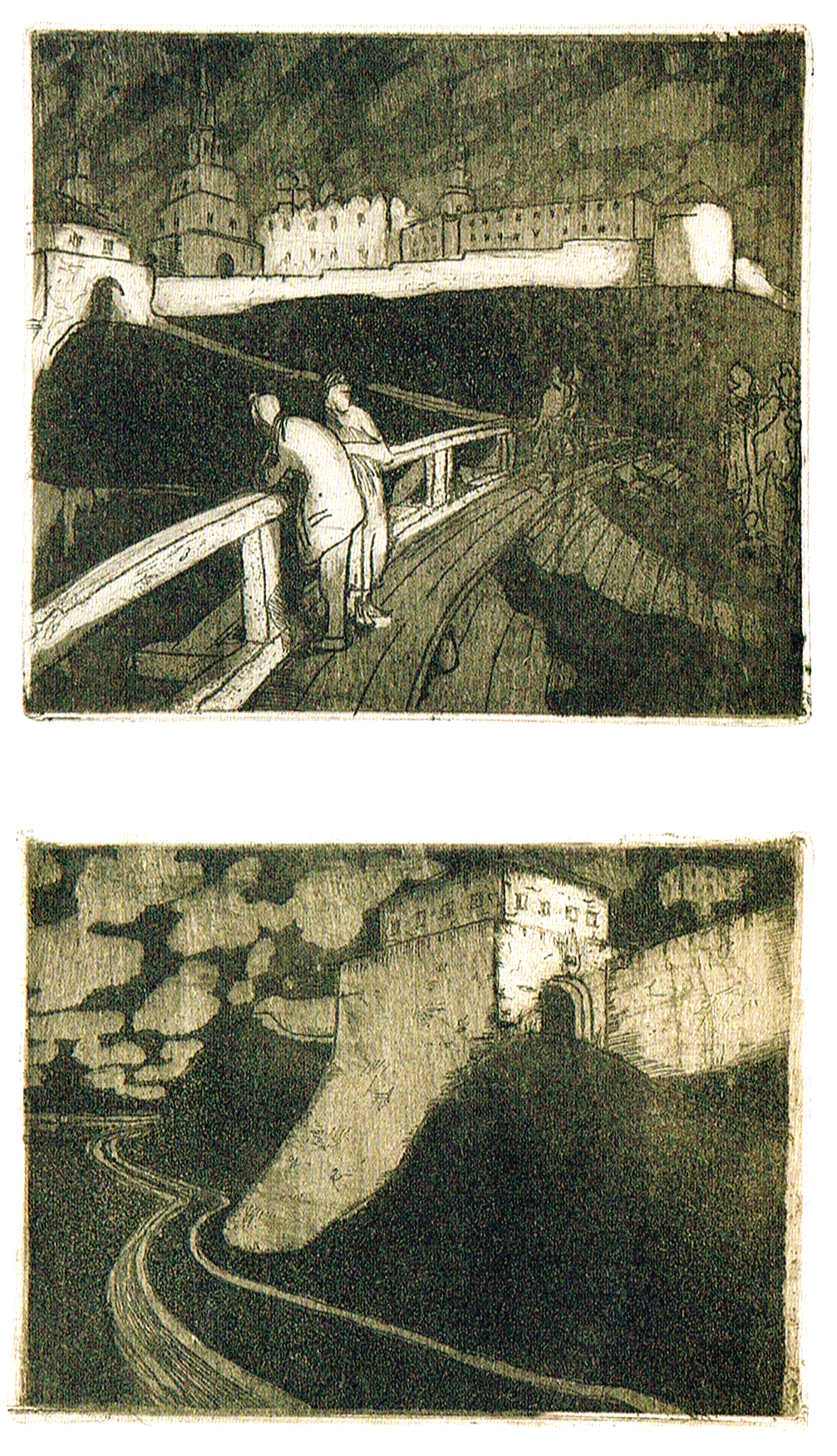 Владимир Владимирович Кудряшев (25 июля 1902, Малые Яльчики Казанской губернии, Российская империя – 09 ноября 1944, Москва). График, скульптор, живописец